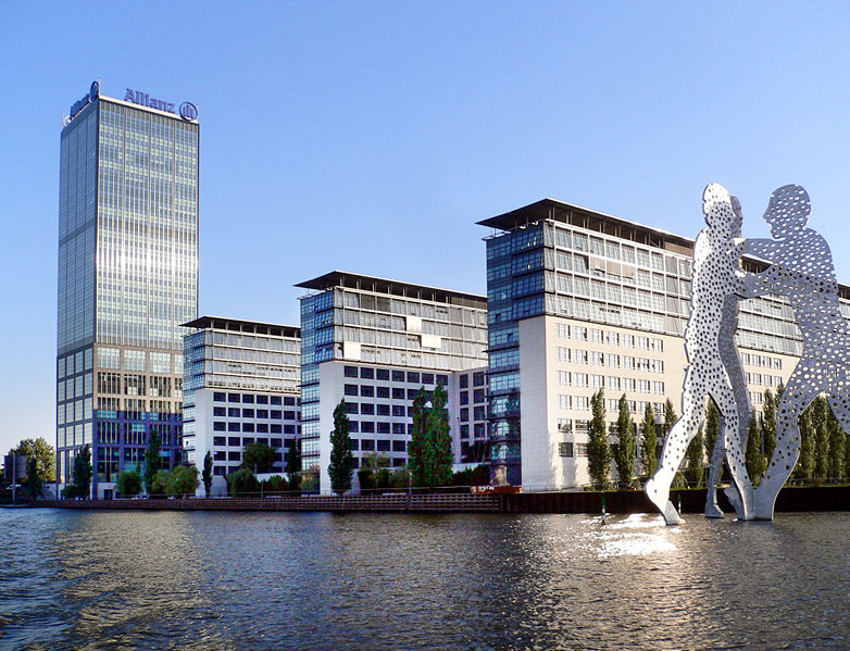 Allianz centar u Berlinu